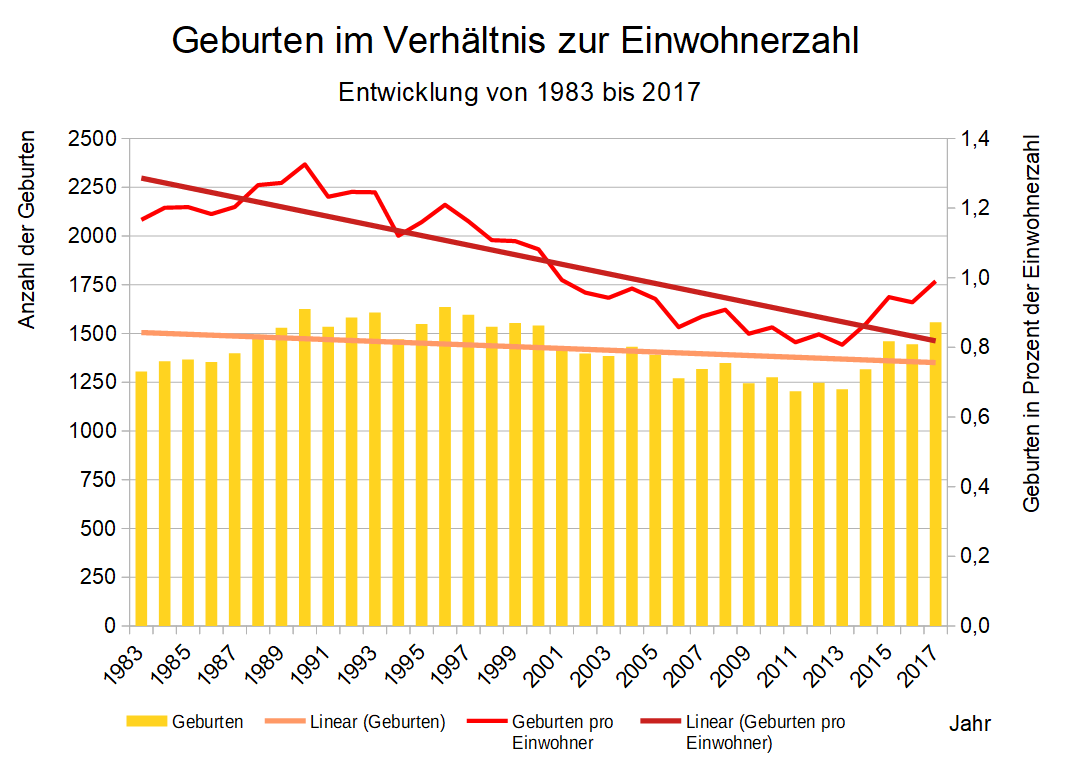 Diese Graphik zeigt die Geburtenentwicklung des Landkreises Landshut von 1983 bis 2017 und setzt sie ins Verhältnis der Geamteinwohnerzahl. Die Datenbasis entstammt dem Bayerischen Landesamt für Statistik.